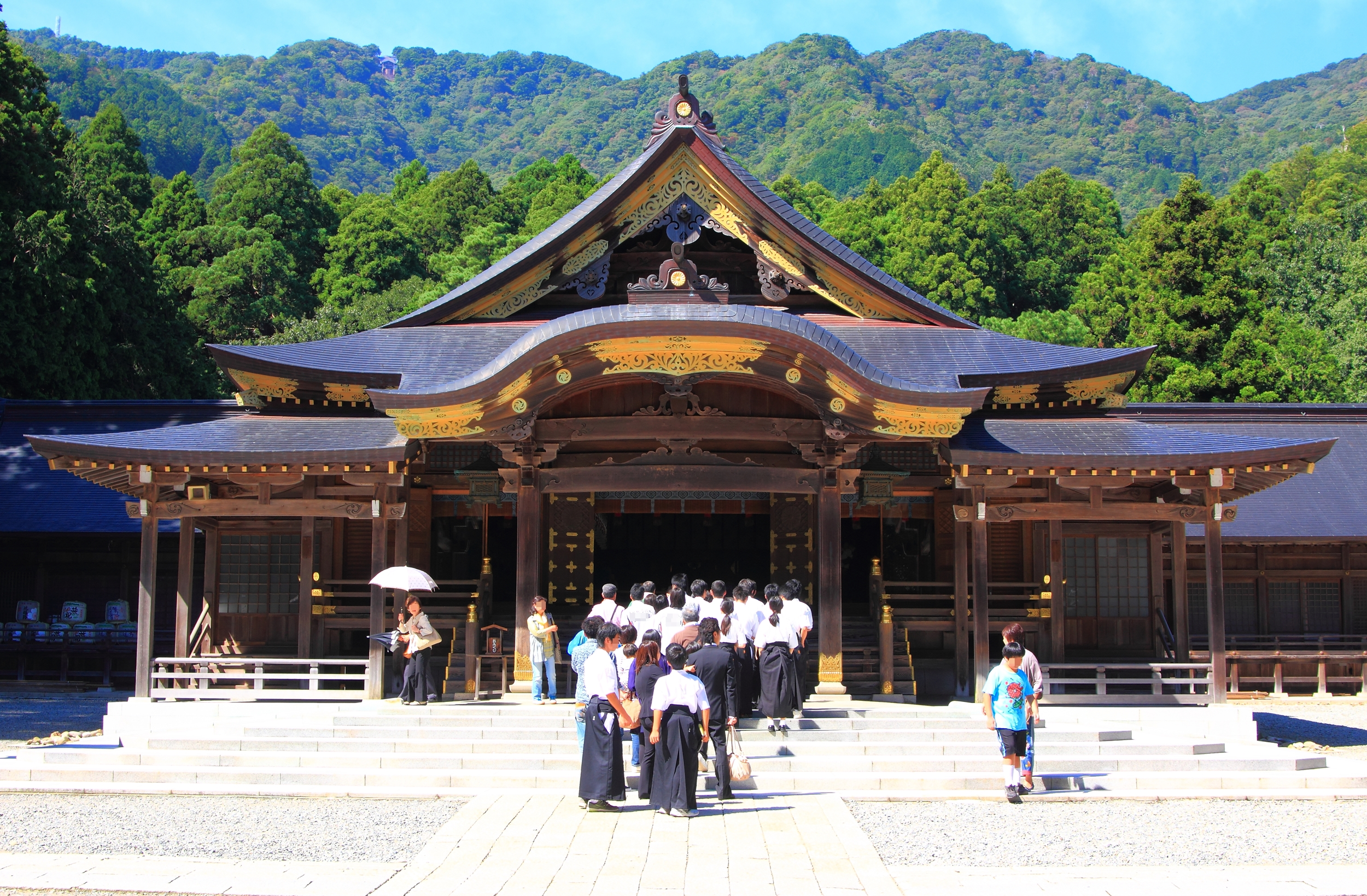 彌彦神社 拝殿(新潟県)